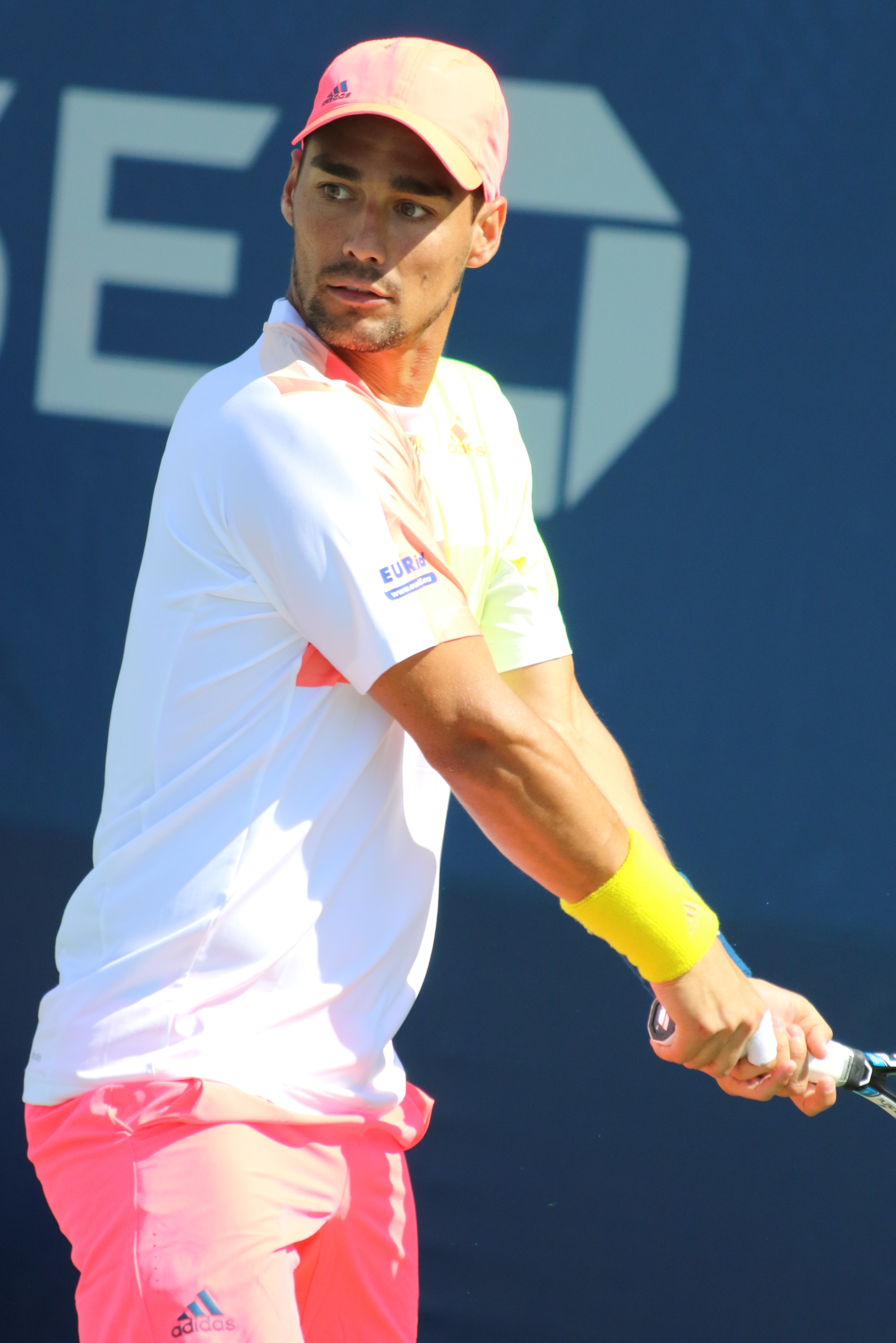 Fognini US16 (14)